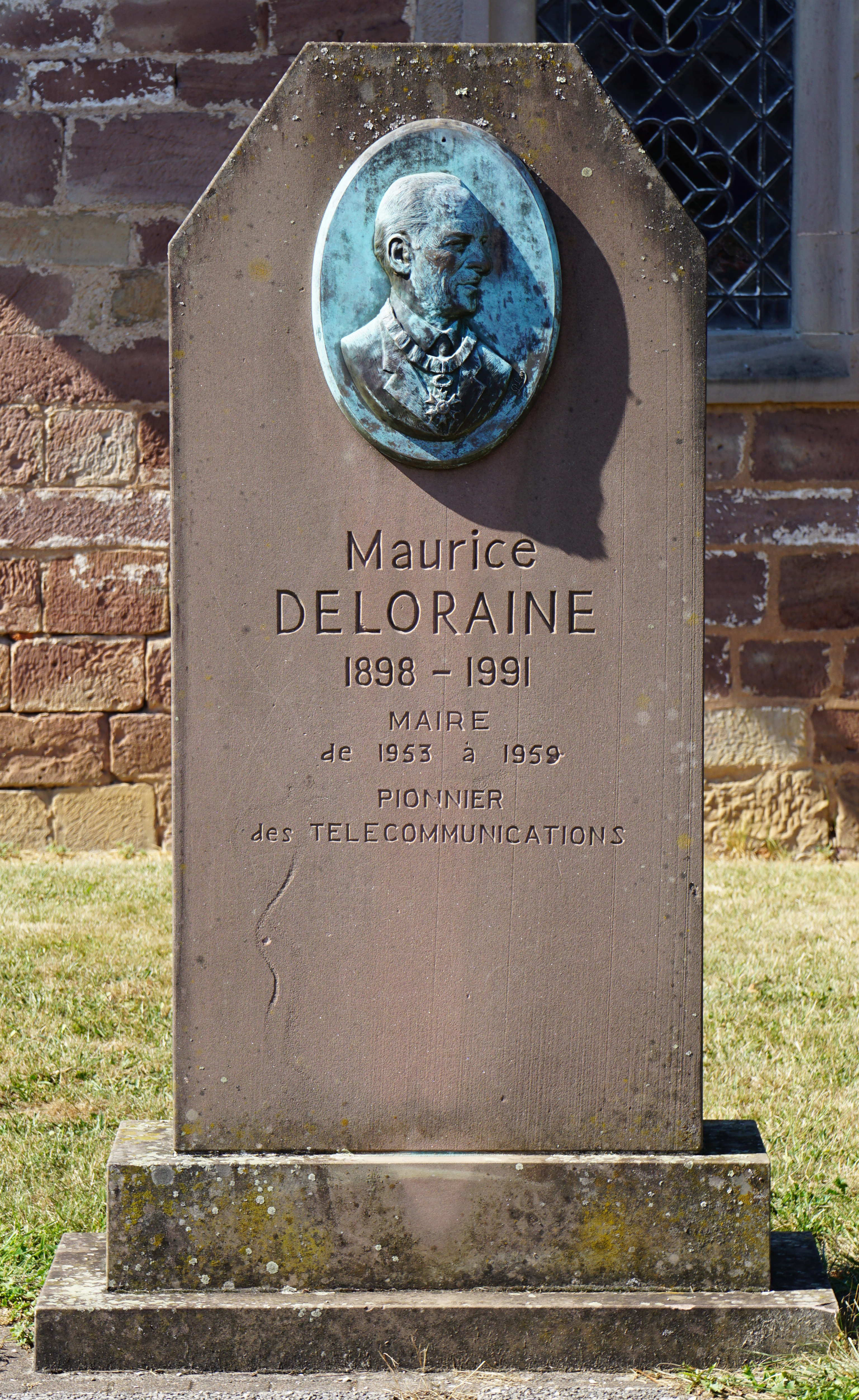 Clairegoutte : buste de Maurice Deloraine (1898-1991), maire de 1953 à 1959, pionnier des télécommunication.